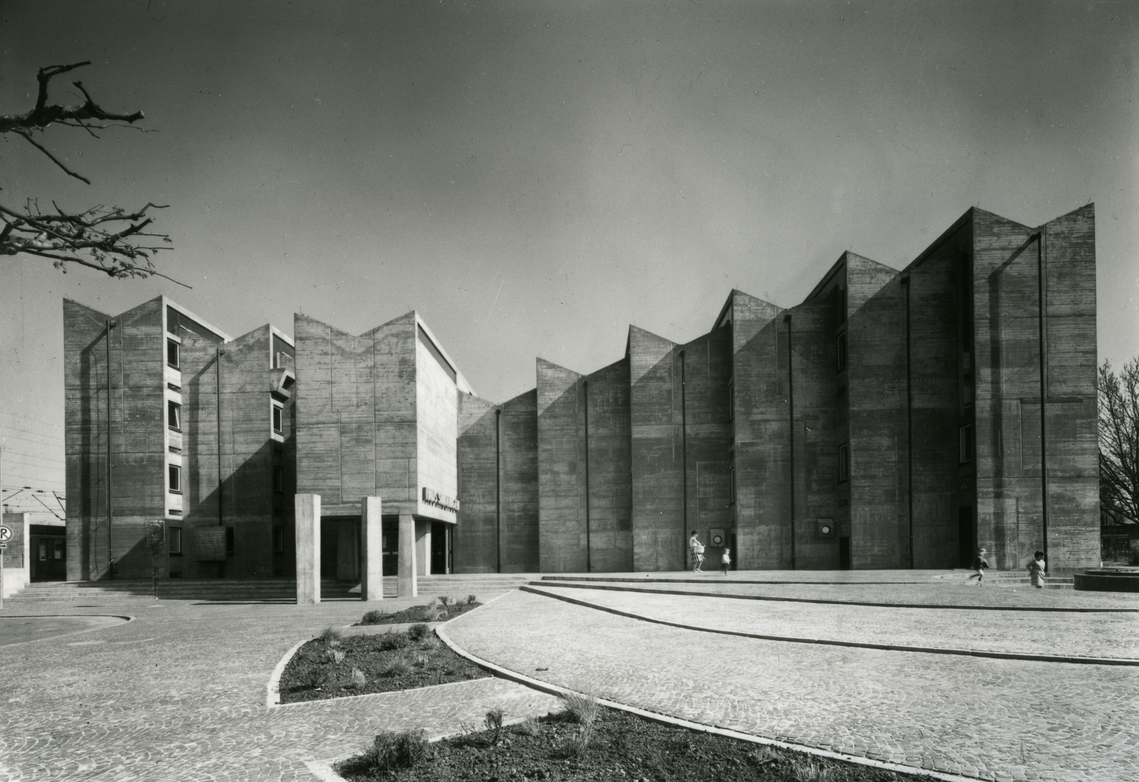 Haus Sindlingen - Architekt: Günter Bock 1918 - 2002, Fotograf: Jupp Falke (Archiv Deutsches Architektur Museum, Frankfurt/M.)